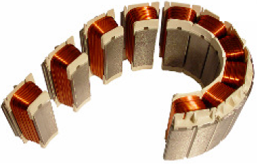 Polkette bestehend aus Statorsegmenten